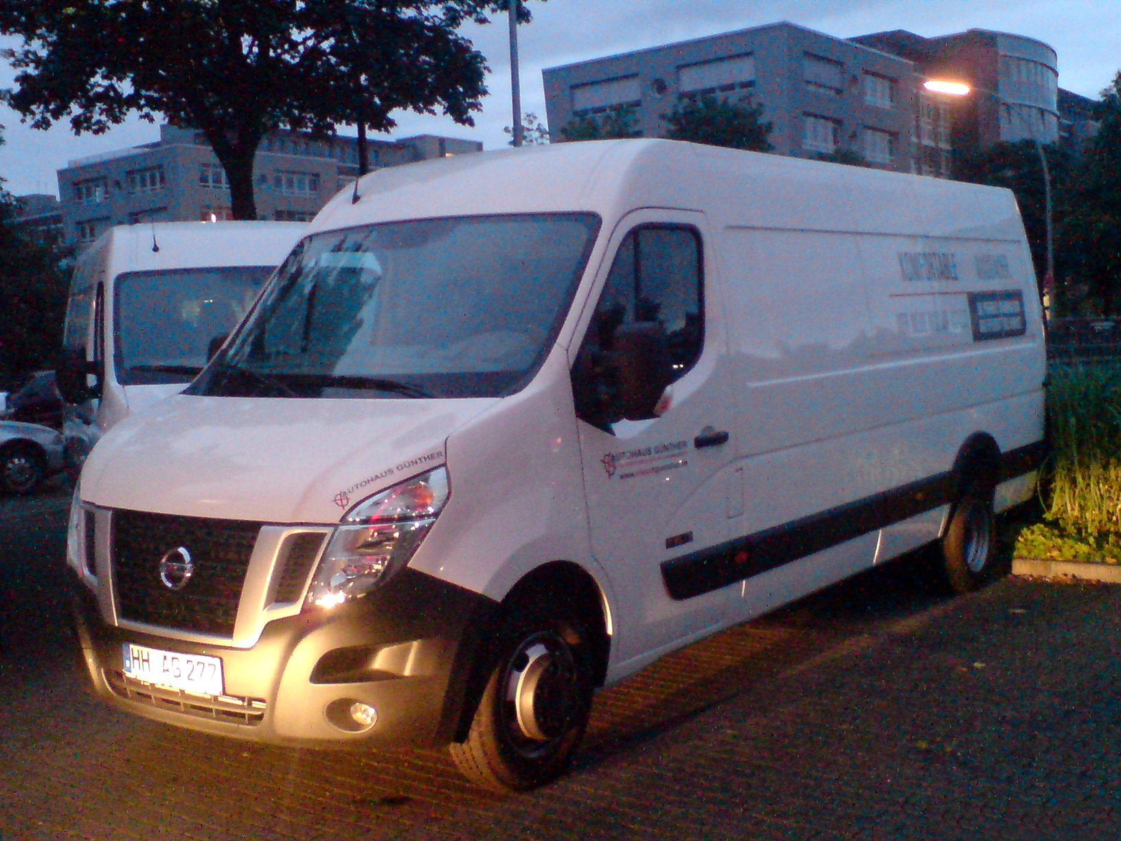 Nissan NV400 Kastenwagen in größter Ausführung